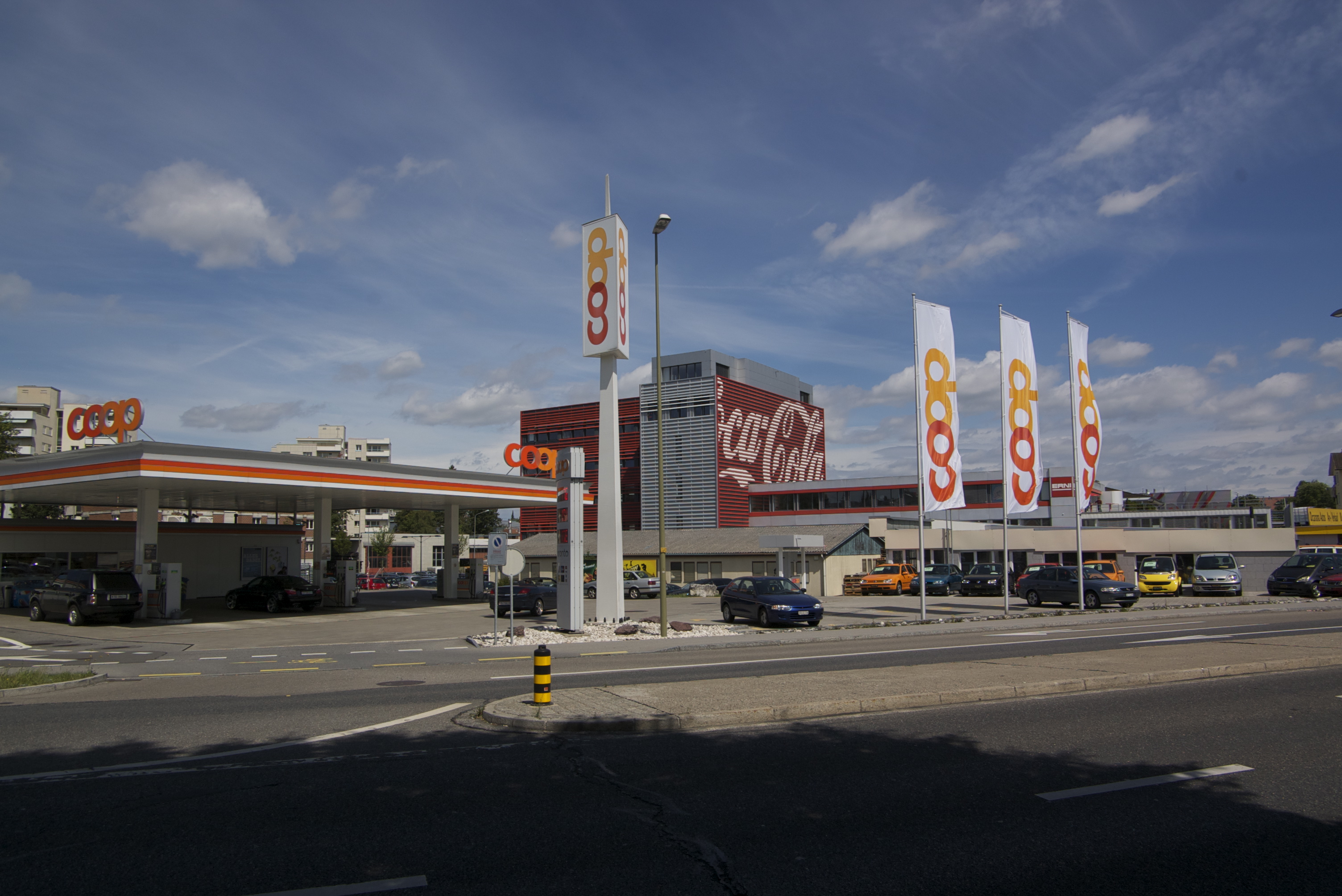 Blick auf Coop-Tankstell an der Zürichstraß und das Coca-Cola-Gebäud an der Grenz zu Dietlikon.